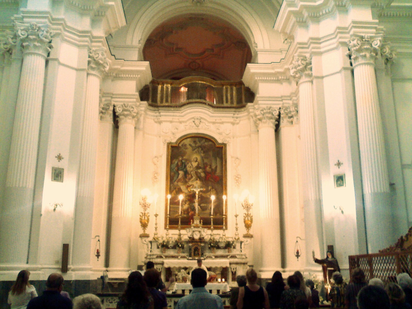 Interno San Francrsco degli Scarioni (Napoli)